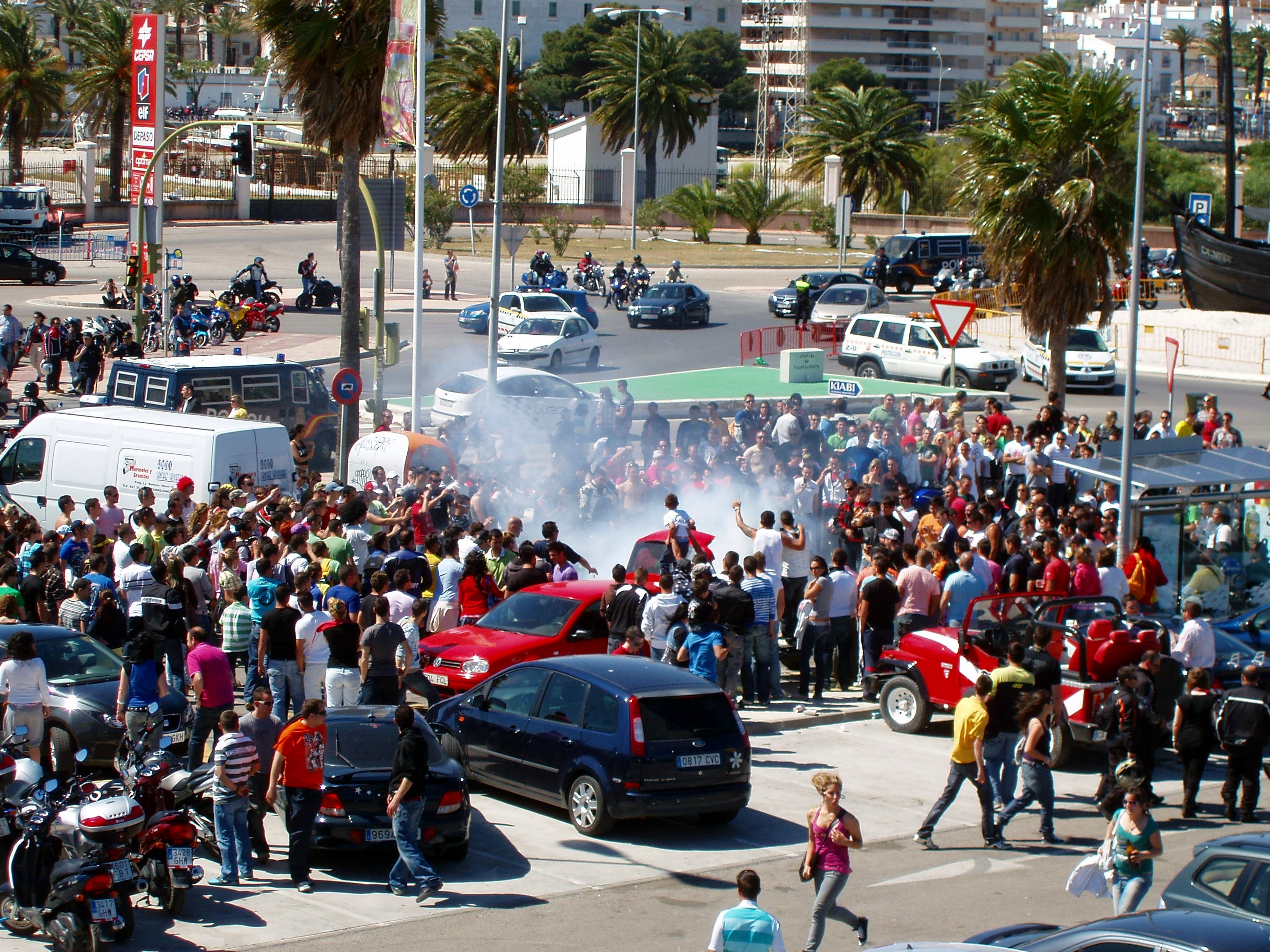 Motorada 2009, cerca de Multicines Bahía Mar